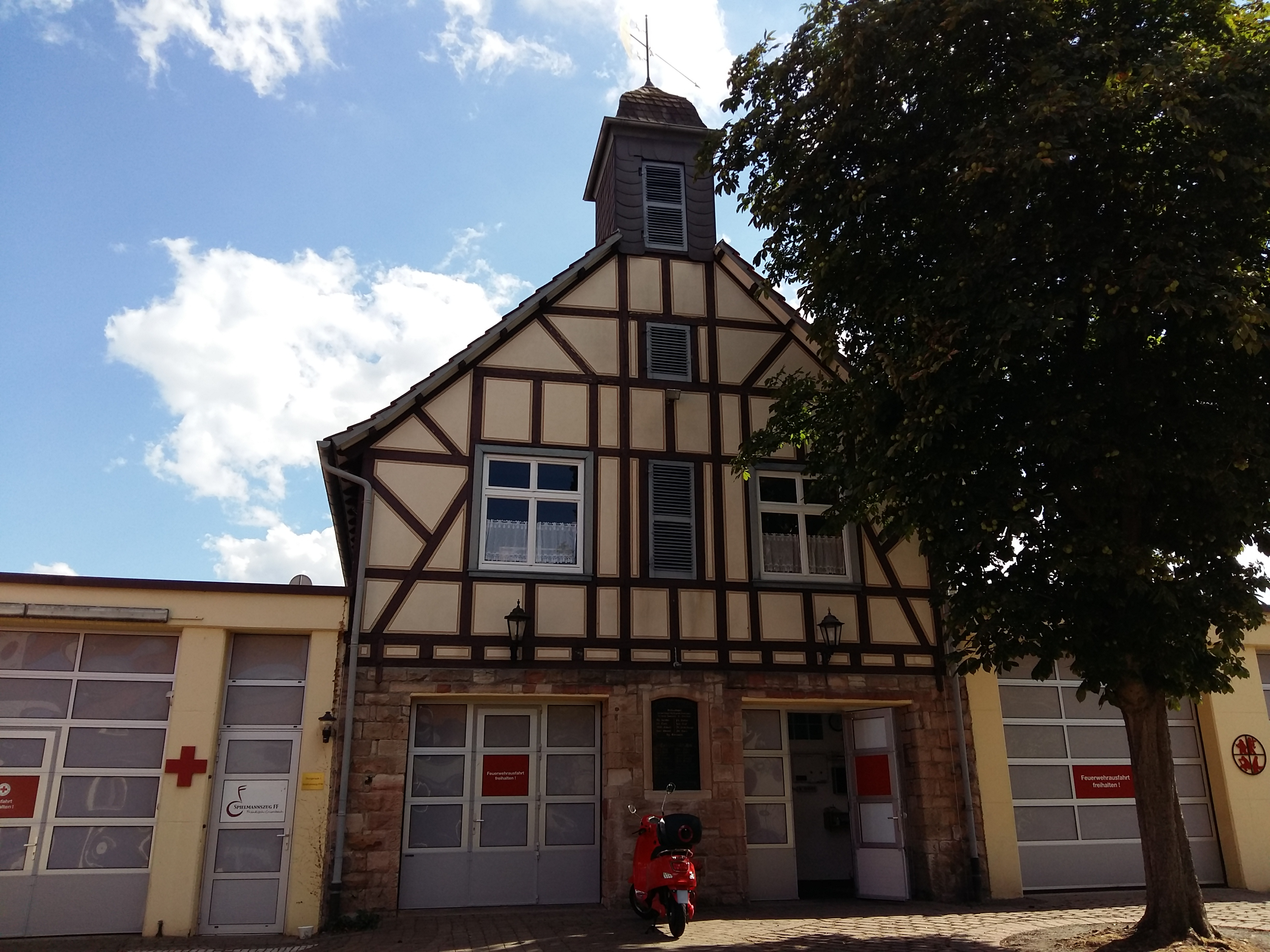 Feuerwehrhaus von Fränkisch-Crumbach und ehemalige Remise des Pretlackschen Palais in der Rodensteiner Straße 8 (von Norden).